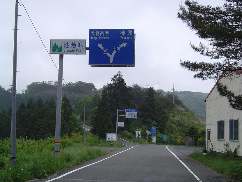 愛媛県道・高知県道383号四国カルスト公園縦断線の高知・愛媛県境にある地芳峠。